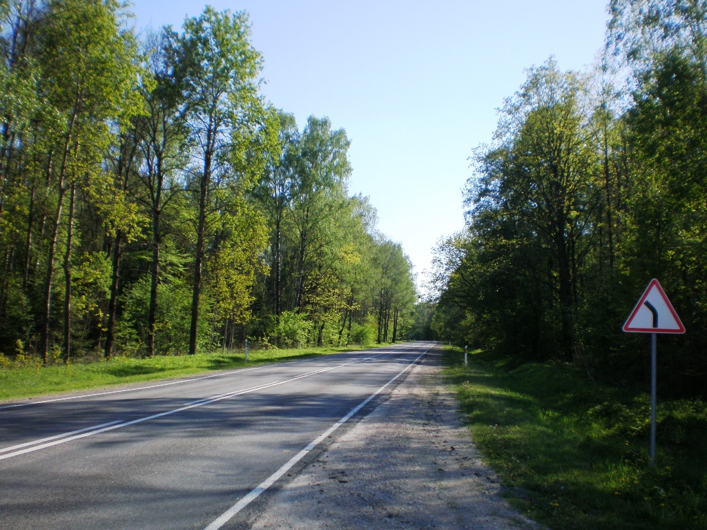 Kunionių miškas Foto: Hugo.arg 2007.05.20